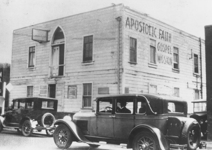 Misión del Evangelio de la Fe Apostólica en 1907, Calle Azusa, Los Ángeles, California, Estados Unidos.